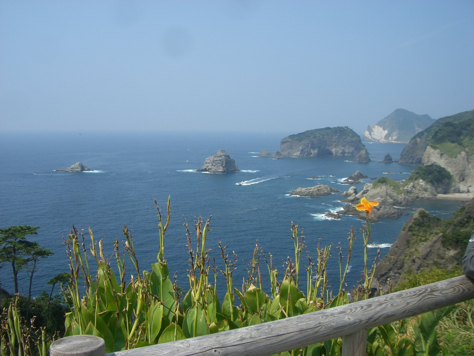 [静岡県] 伊豆-伊豆半島の南端、石廊崎を少し過ぎたとこにある奥石廊の展望台より。天気はいいが少しガス。